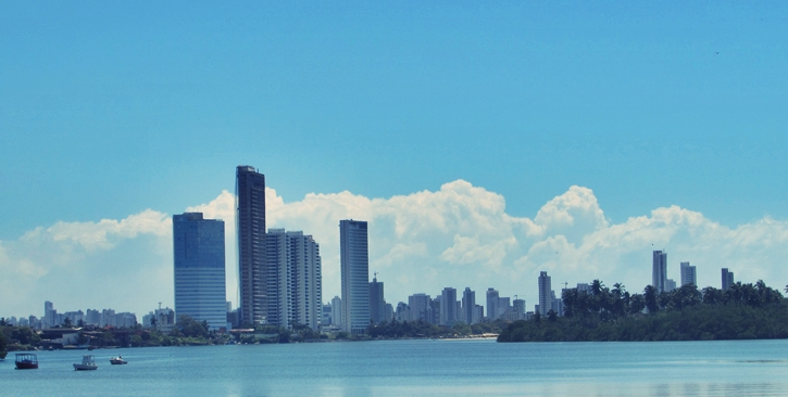 Prédios no bairro de Barra de Jangada no município de Jaboatão dos Guararapes.